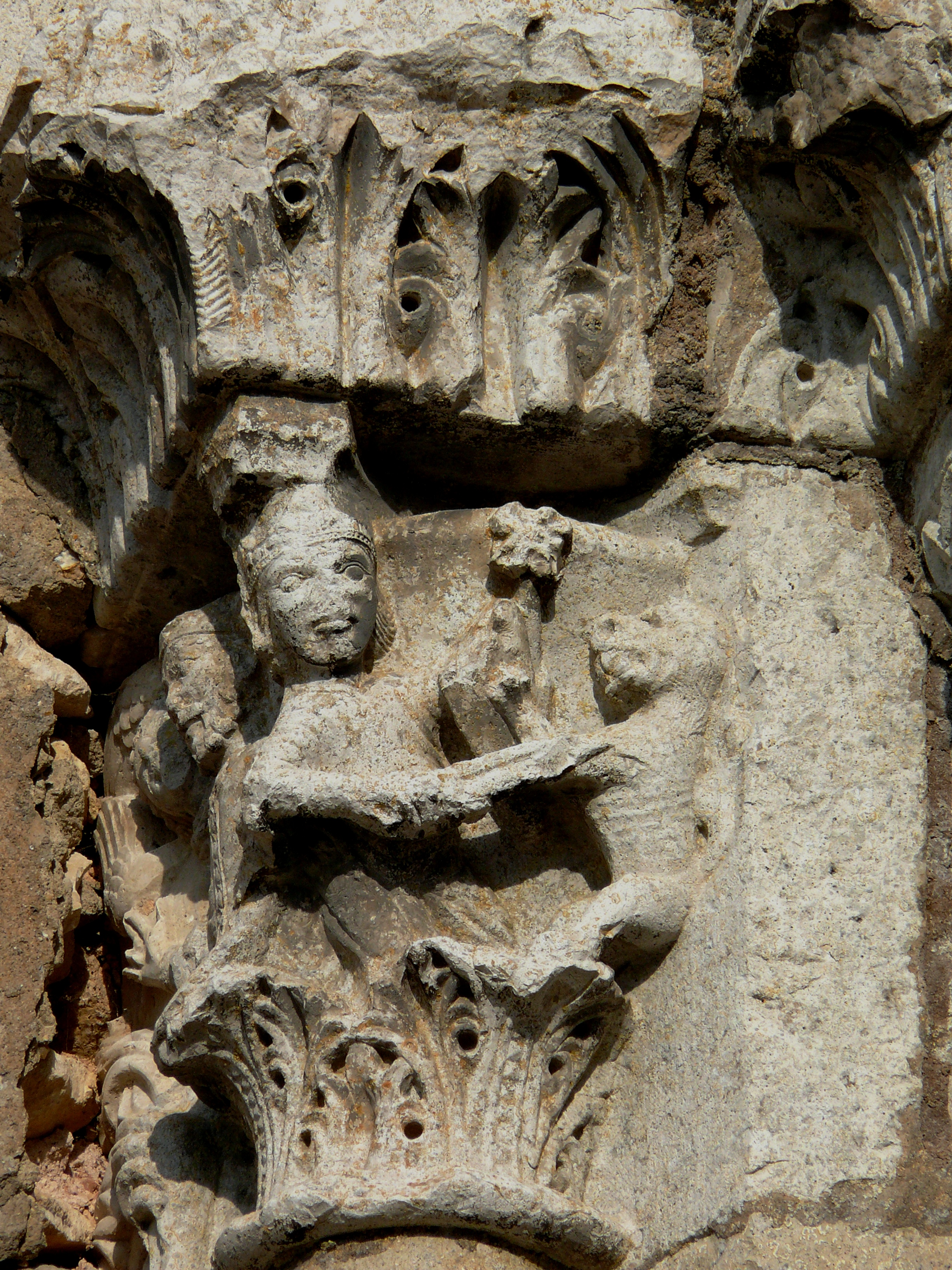 Ferrières - Abbaye - Eglise Saint-Pierre-et-Saint-Paul - Chapiteau représentant le combat de Pépin le Bref avec le lion